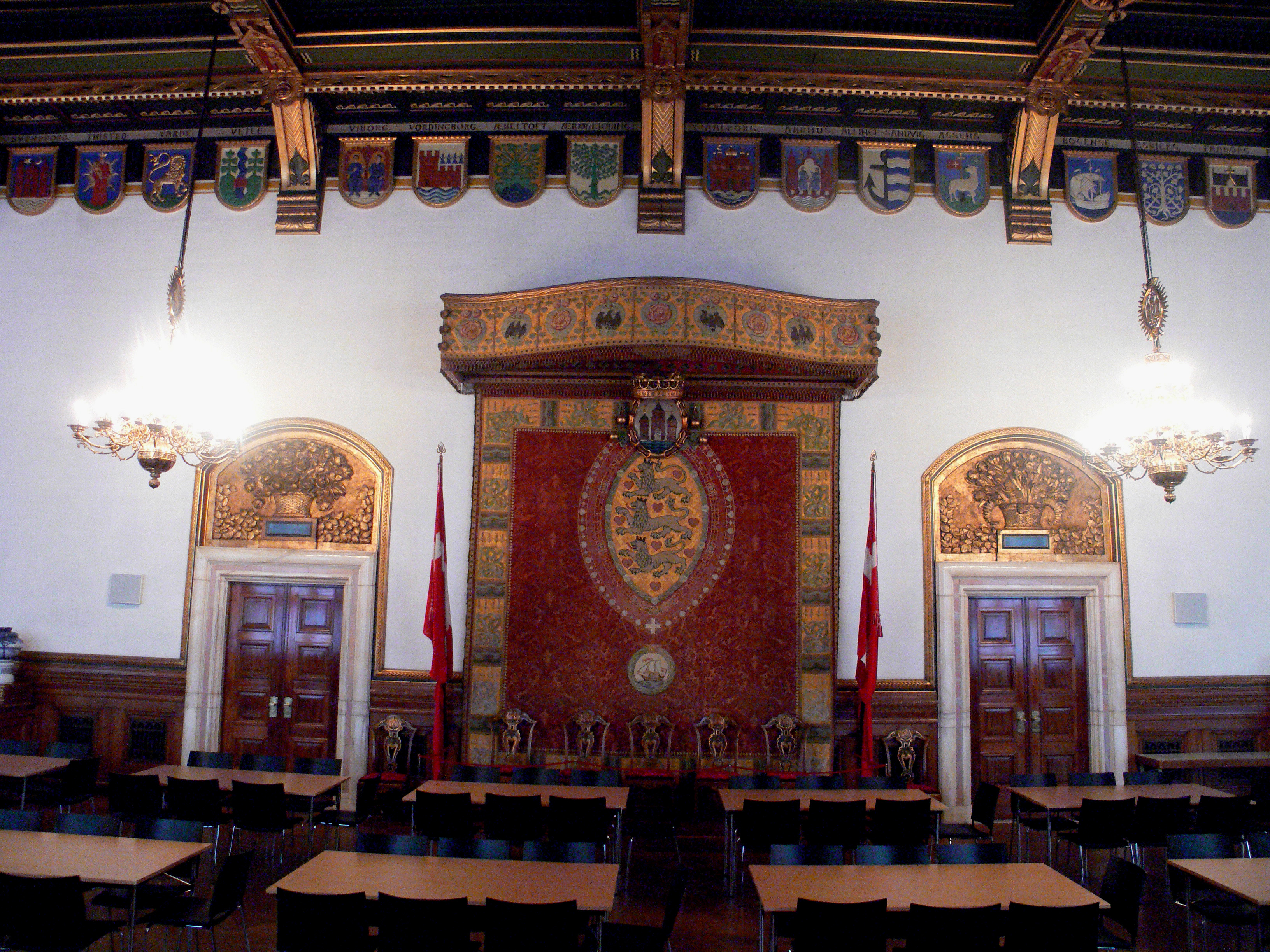 Rathaus in Kopenhagen